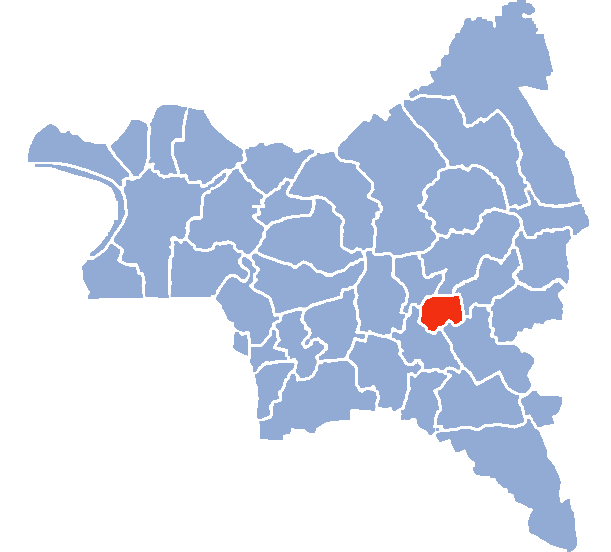 Auteur Hervé SUAUDEAU Licensing Catégorie:Cartes de Seine-saint-Denis Catégorie:Le Raincy